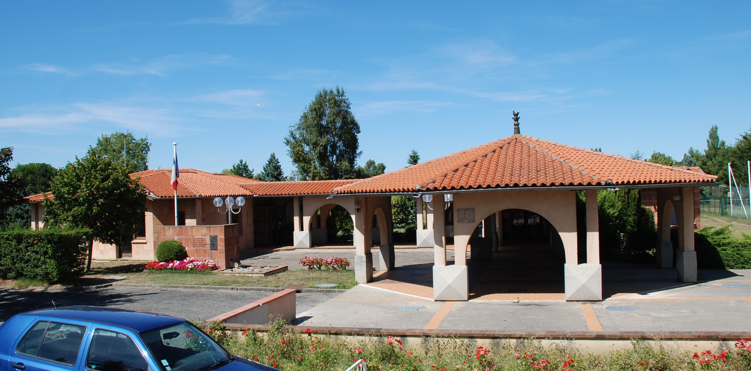 Mairie de Vigoulet-Auzil (Haute-Garonne, Midi-Pyrénées, France.